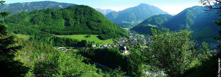 Beschreibung: Hollenstein an der Ybbs Quelle: Archiv Dipl.-Ing. Georg Hageneder Fotograf: Dipl.-Ing. Georg Hageneder Aufnahmedatum: 30.5.2004